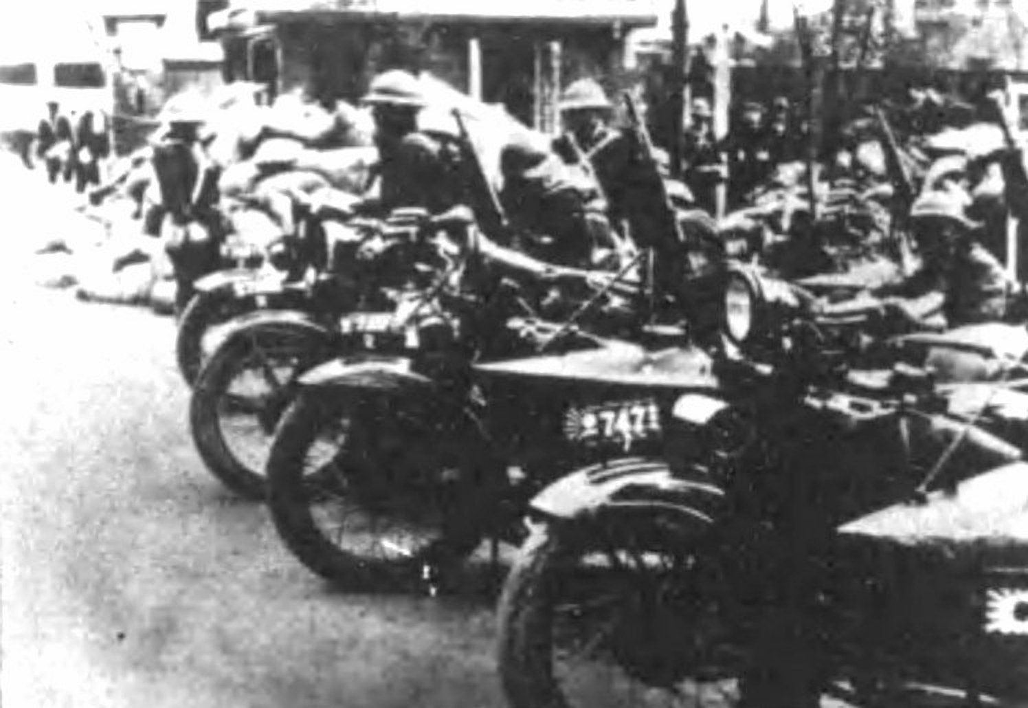 上海事変において使用される側車付自動二輪車